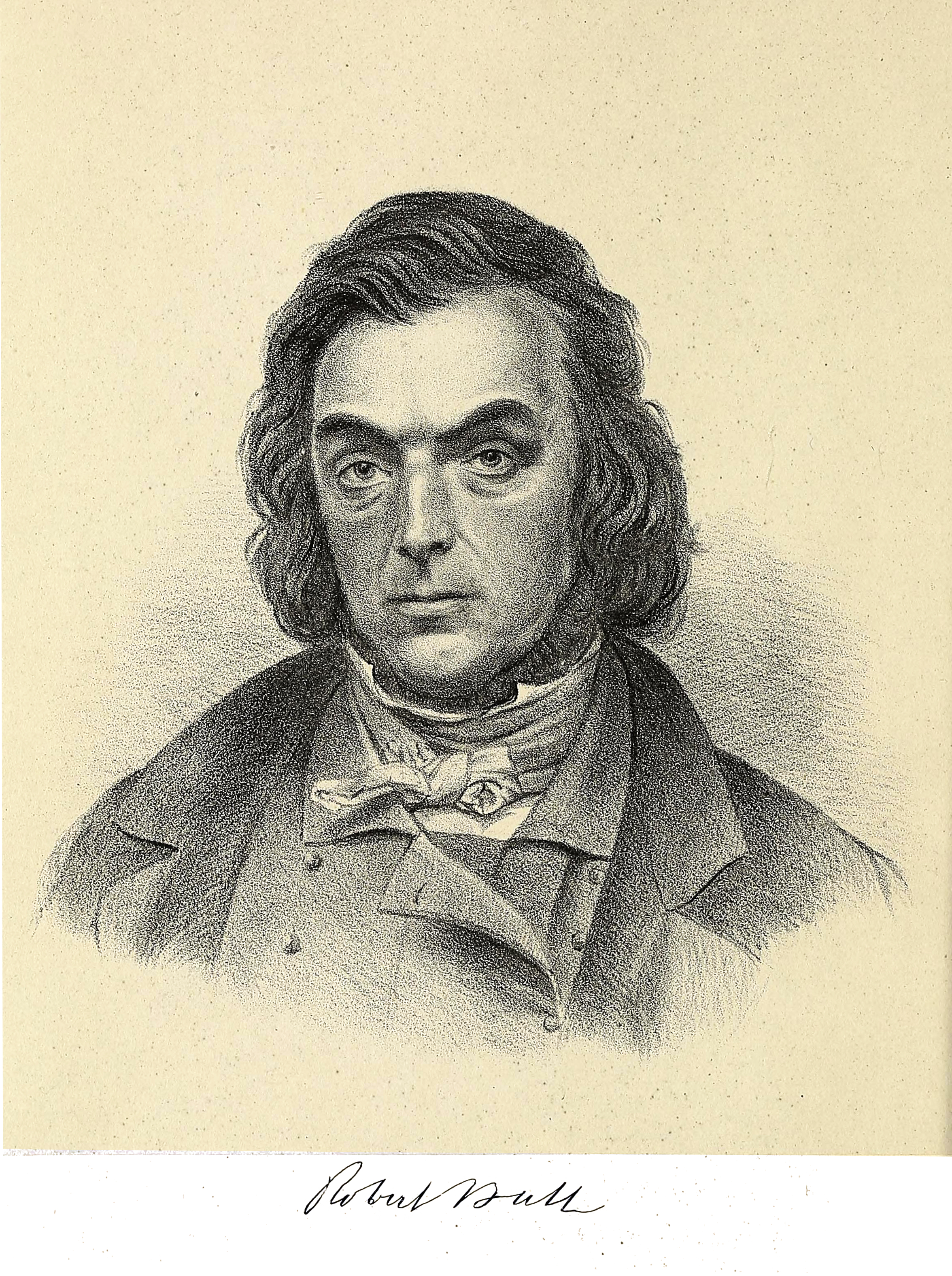 Robert Ball